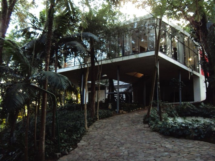 Casa de Vidro, marco da arquitetura de São Paulo, projetada pela arquiteta Lina Bo Bardi. Foto: Thiago Esperandio/Ministério da Cultura